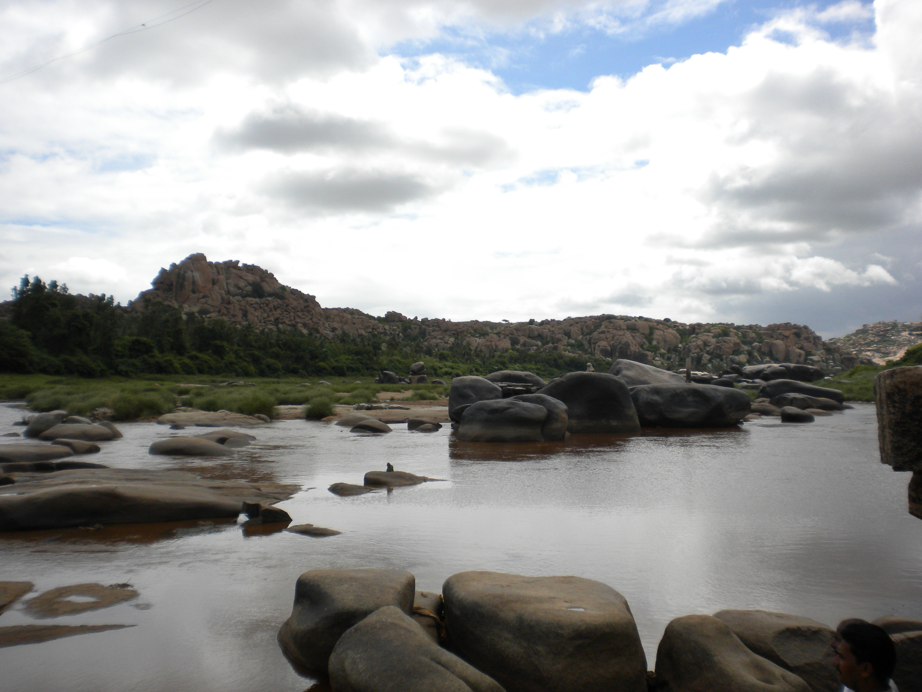 यह चित्र उत्तरी कर्नाटक के ऐतिहासिक शहर हम्पी में नदी के तट पर ५ जून २०११ को लिया गया था । यहाँ नदी का मार्ग पत्थरों से भरा है और प्रवाह अत्यंत कम है । क़रीब २५ किलोमीटर उत्प्रवाह पर बने बाँध की वजह से जून महीने में पानी का बहाव और भी कम है